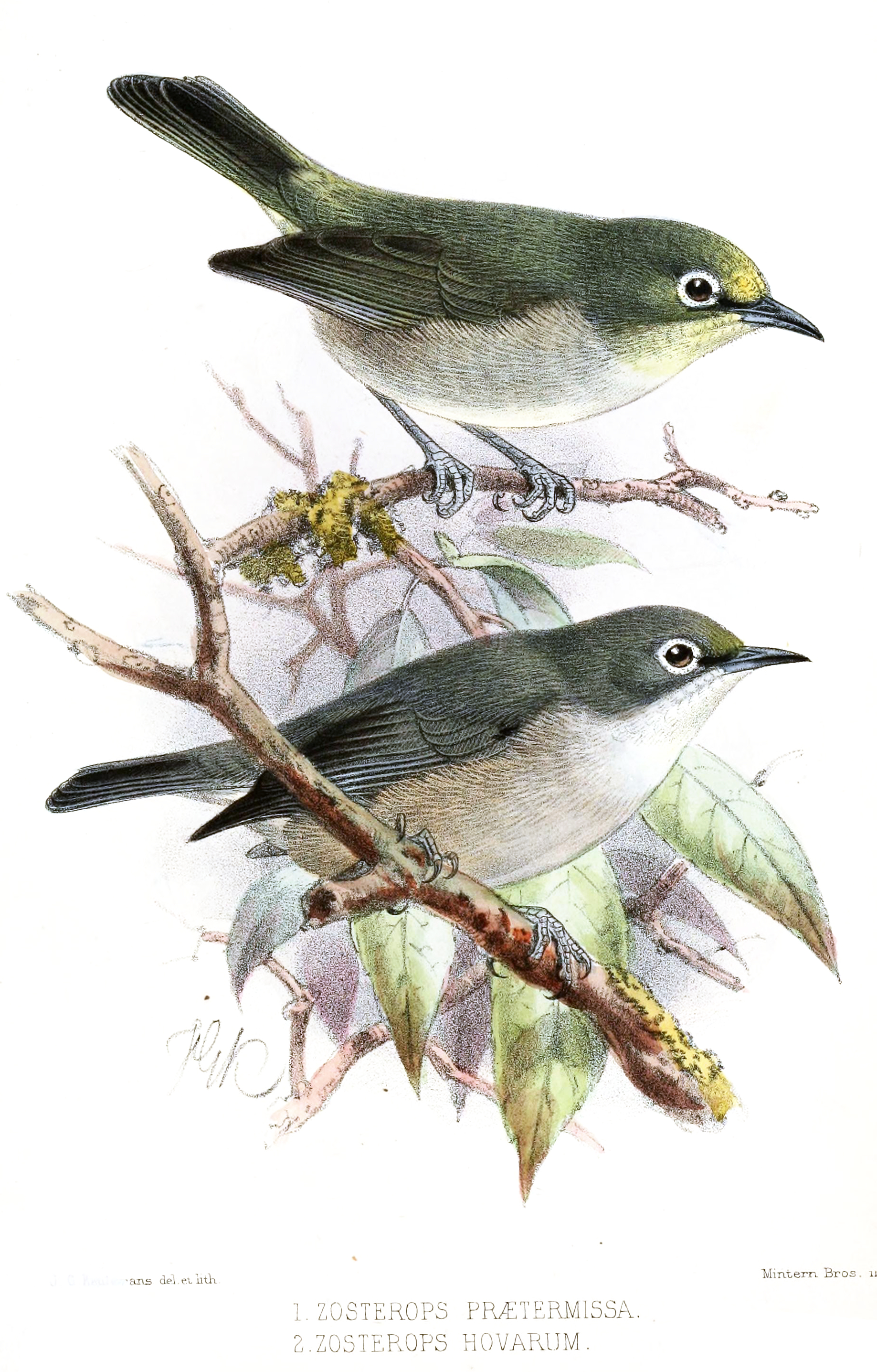 Zosterops praetermissa = Zosterops anjuanensis[1]= Zosterops maderaspatana anjuanensis[2] Zosterops hovarum = Zosterops maderaspatanus hovarum[3]